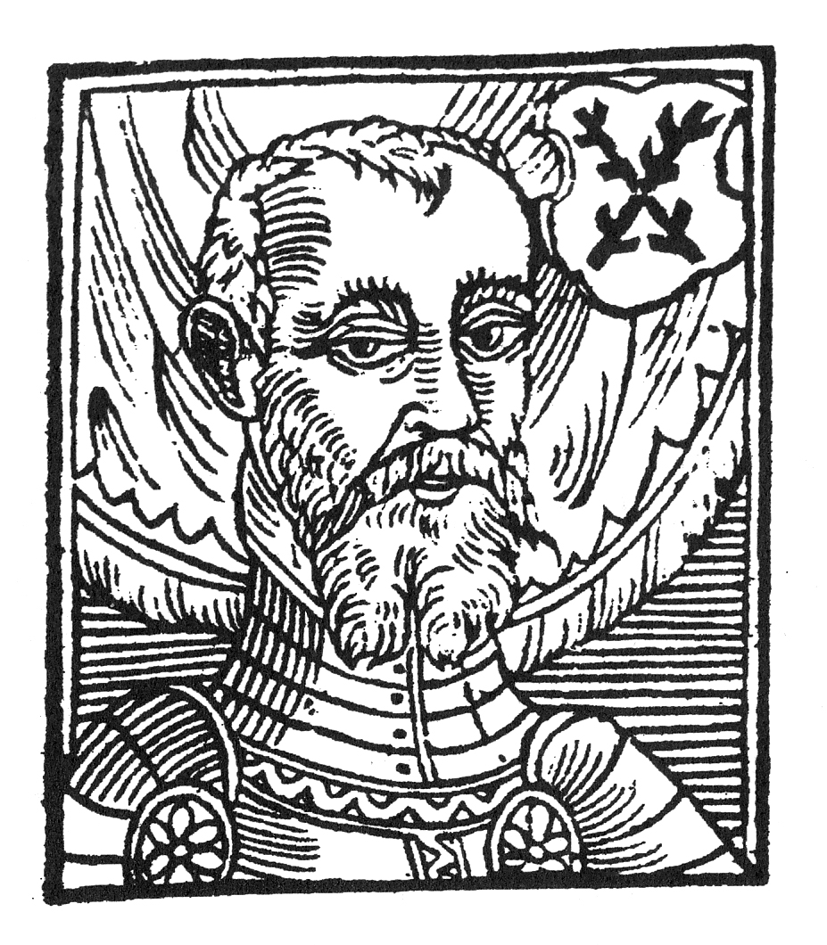 Fiktivní portrét Hynka Krušiny I. z Lichtenburka od Bartoloměje Paprockého, Diadochus